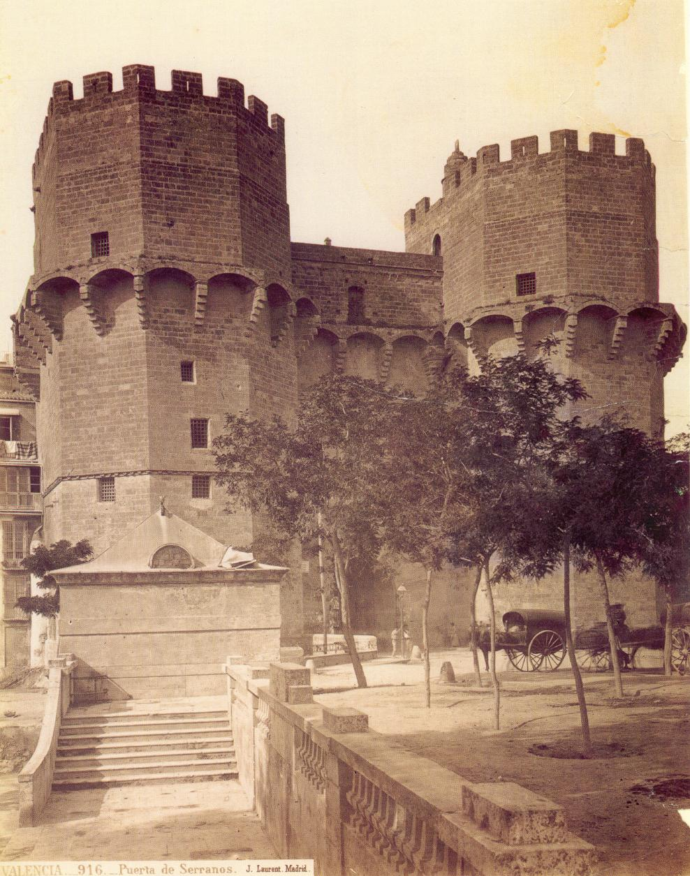 Porta o Torres de Serrans de València 1870, de Jean Laurent Minier (1816 - 1886).